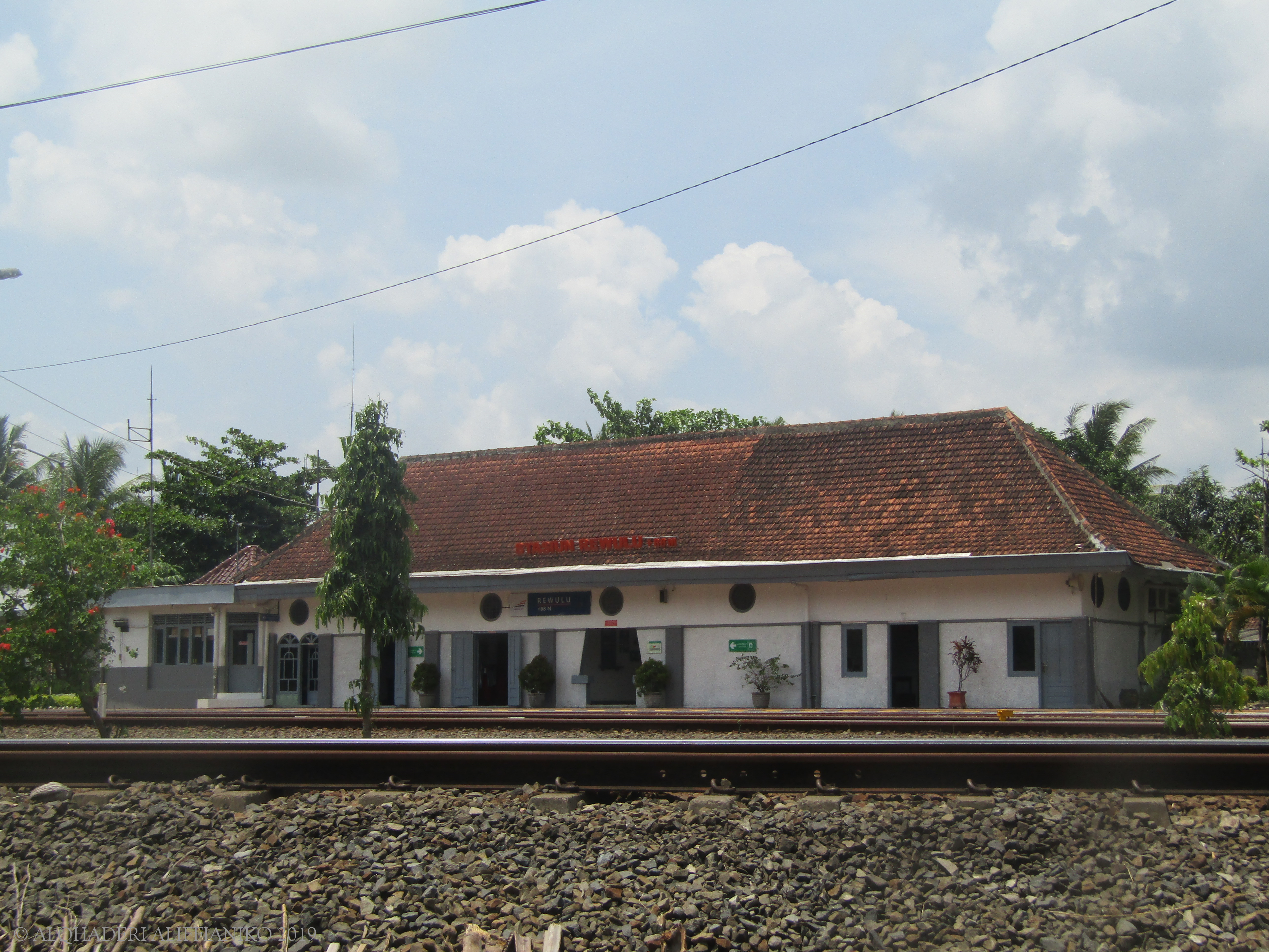 Bangunan utama Stasiun Rewulu saat lengang, 2019